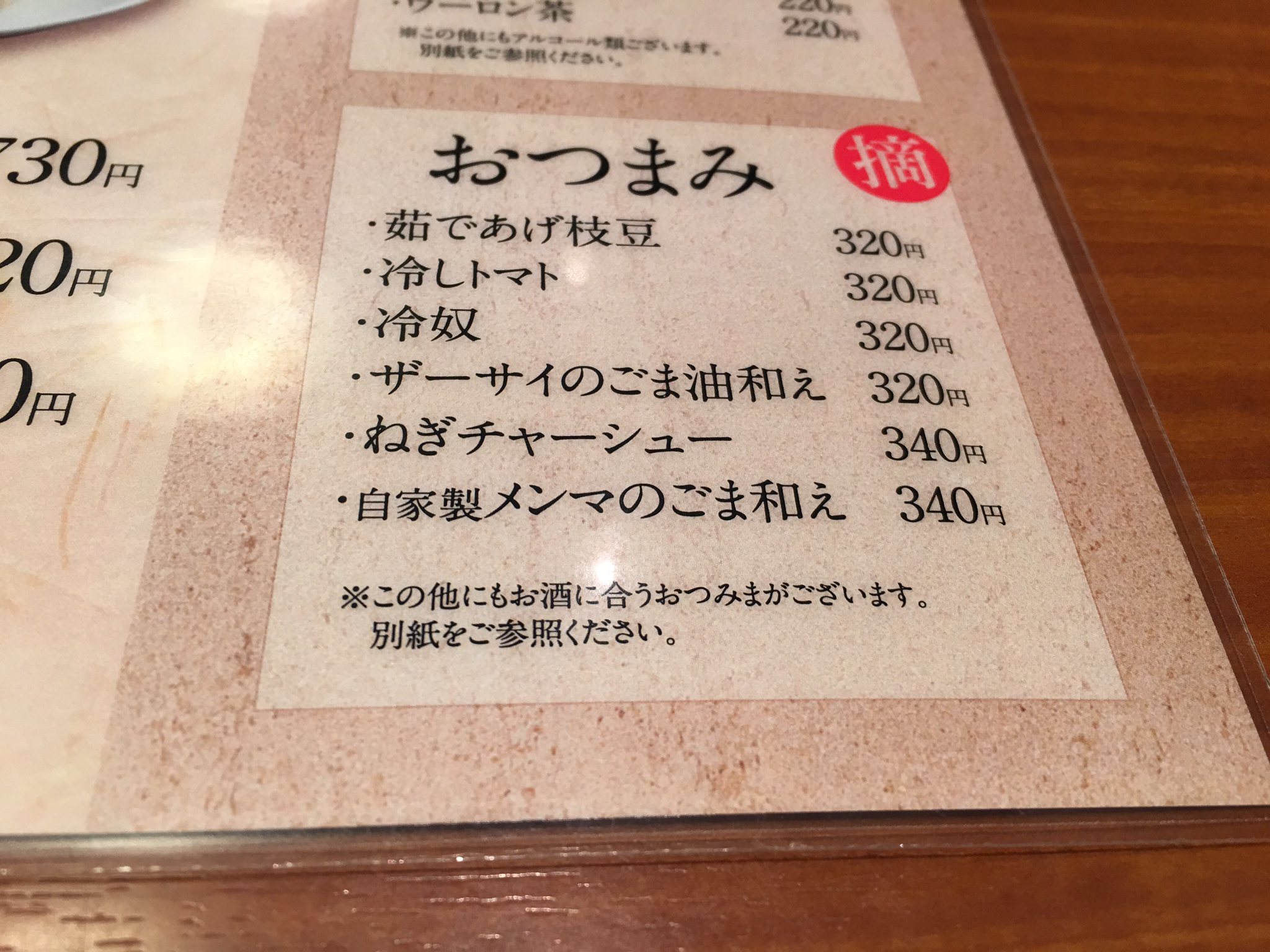 「おつまみ」のメニューであるが、画像下部にある文章では「その他お酒に合うおつみまがあります」という文章に誤植してしまっている。